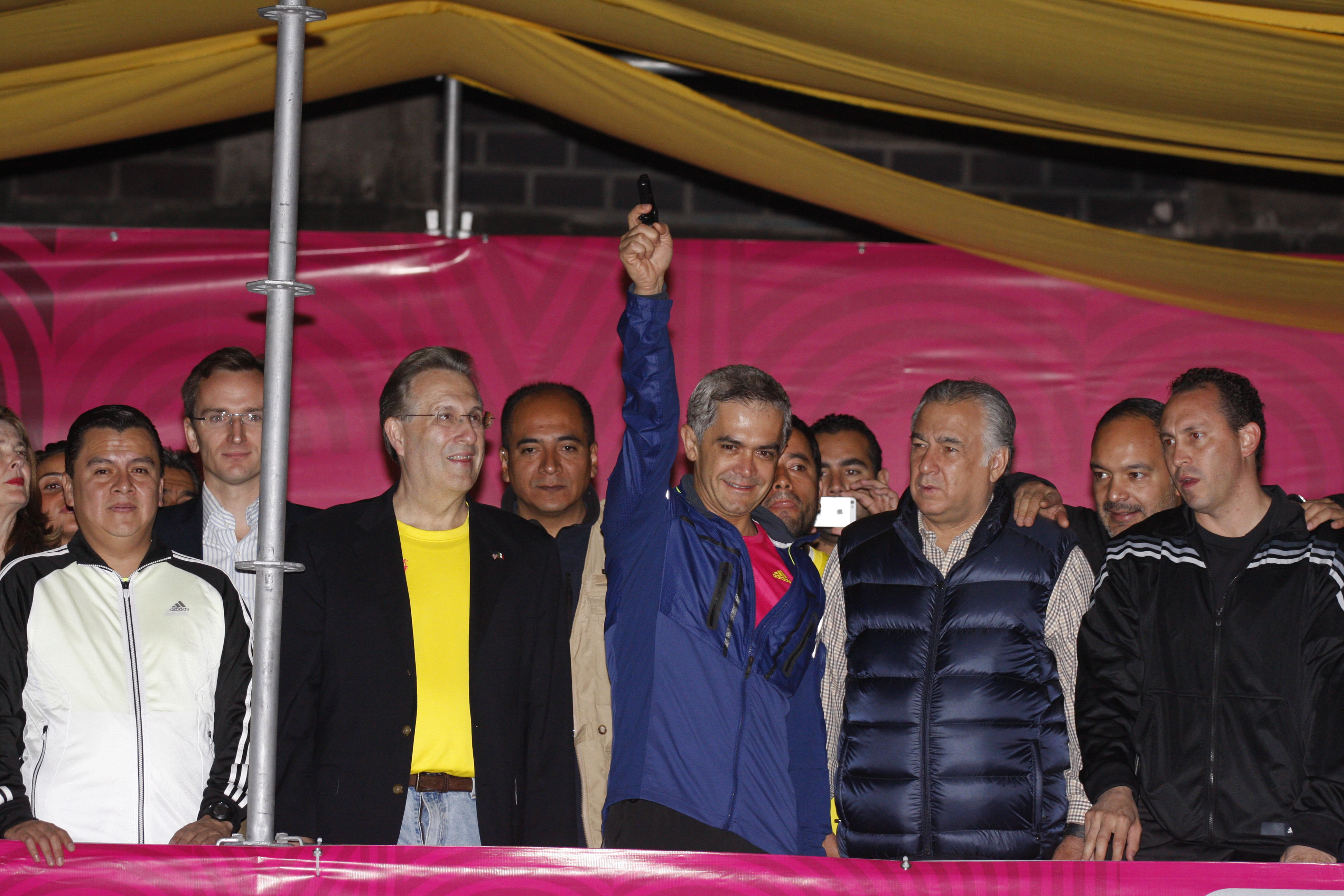 Miguel Angel Mancera dio el banderazo de salida al XXXI Marathon Internacional de la Ciudad de Mexico. Foto Octavio Nava